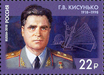 100 лет со дня рождения Г.В. Кисунько (1918–1998), учёного, основоположника противоракетной обороны. На марке изображён портрет учёного, комплекс «Енисей» и ПУ с ракетой В-1000.